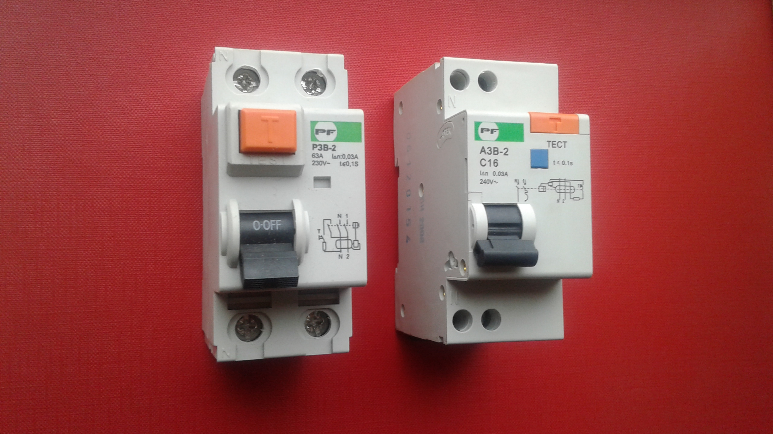 захист1